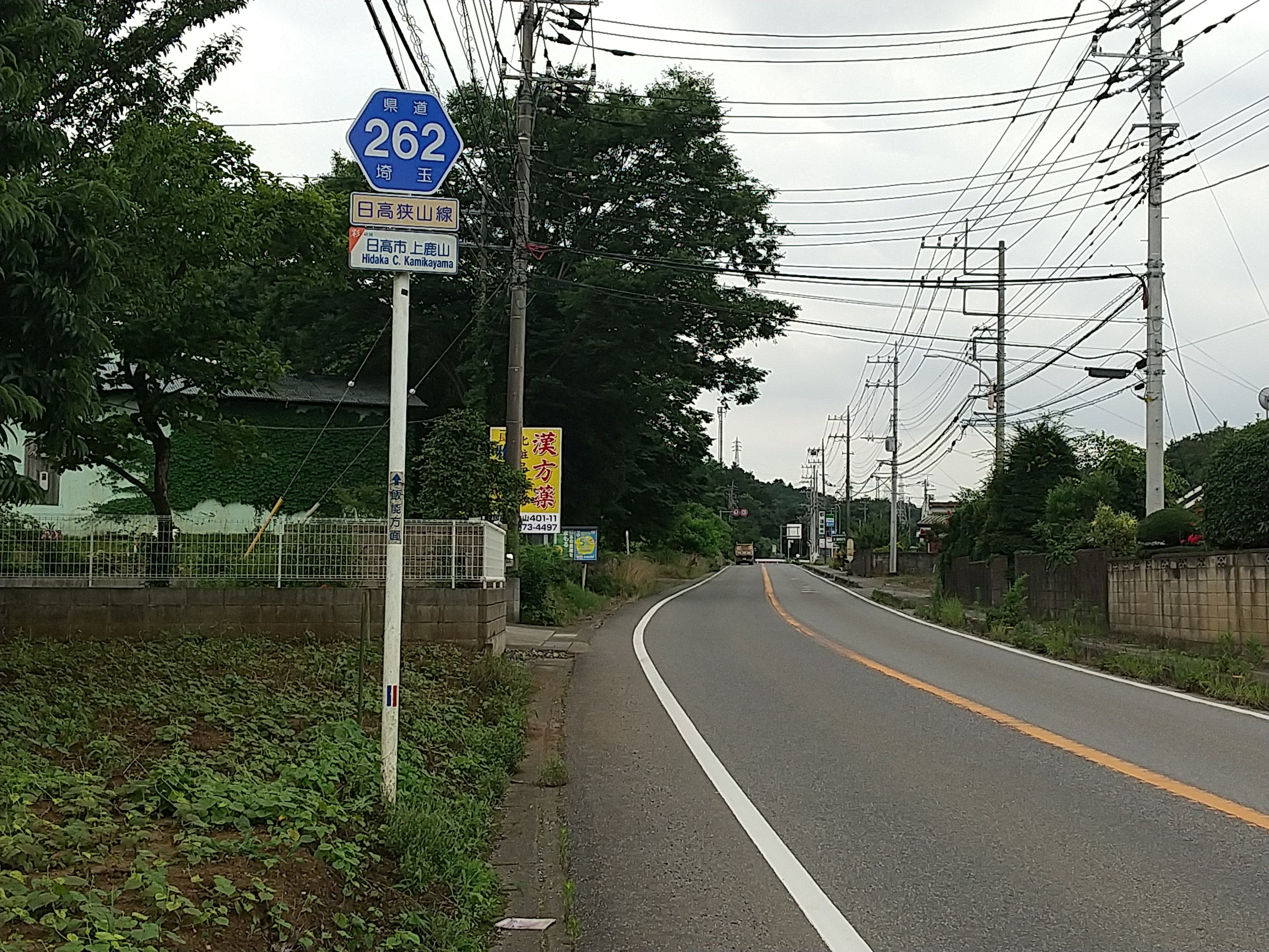 上鹿山にて（旧埼玉県道30号）